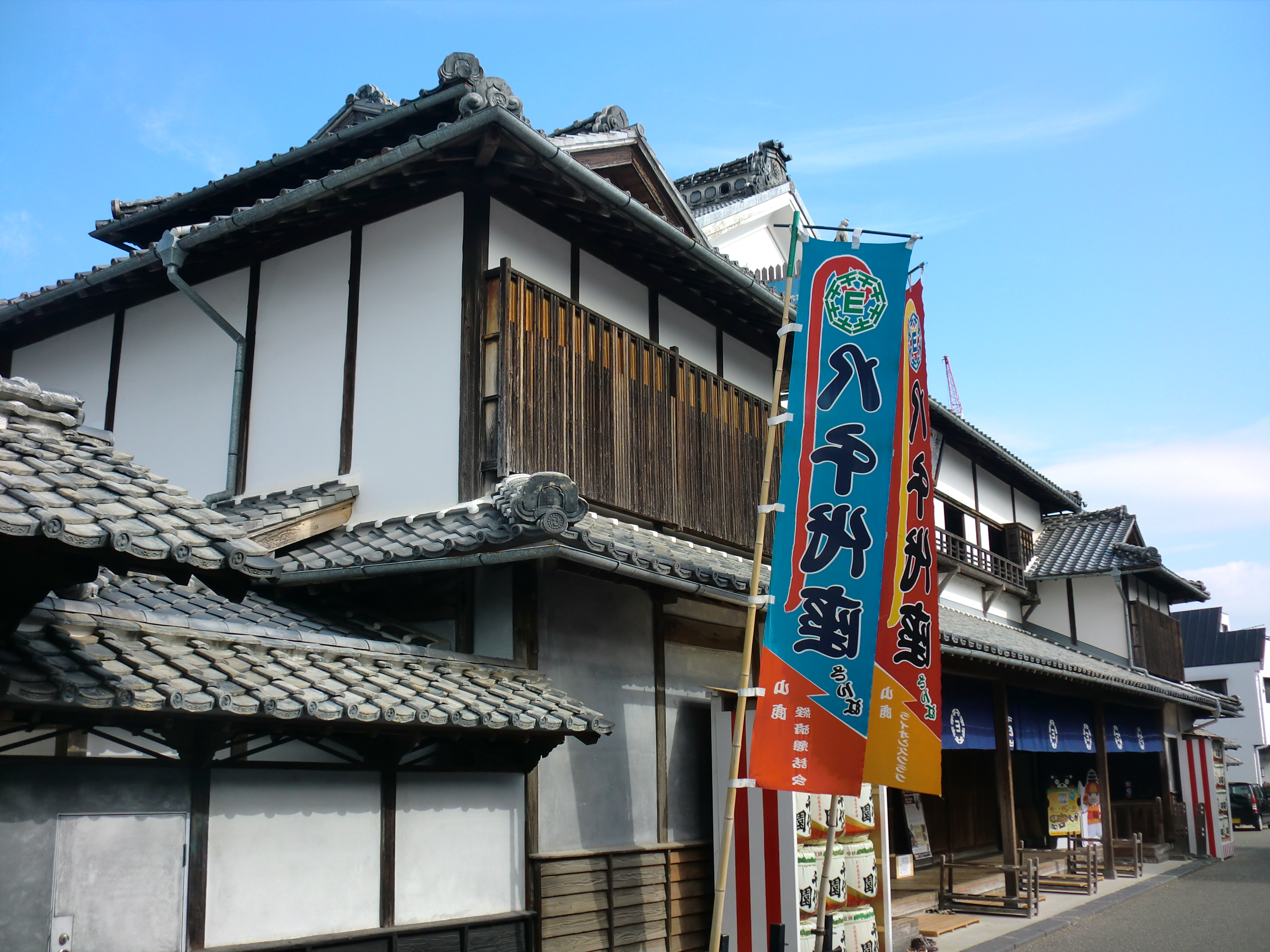 熊本県山鹿市にある八千代座